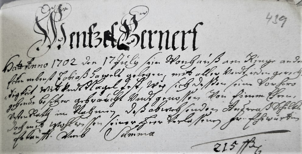 Im 18.Jh. vereinfacht sich die Schrift gegenüber der Darstellungen der Initiale der gleichen Ratfamilie Gernert im 16.Jh. wesentlich